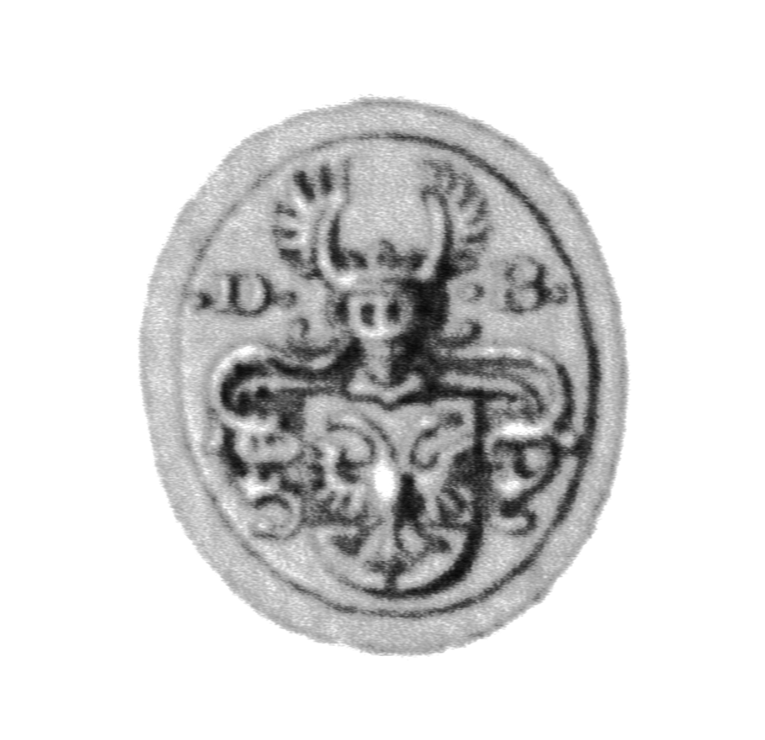 Siegel des Ratsmannes Ditrich Brömse. Das Siegel stammt aus der Zeit um 1598. Siehe Emil Ferdinand Fehling: Lübeckische Ratslinie, Nr. 687 (Dietrich von Broemse).